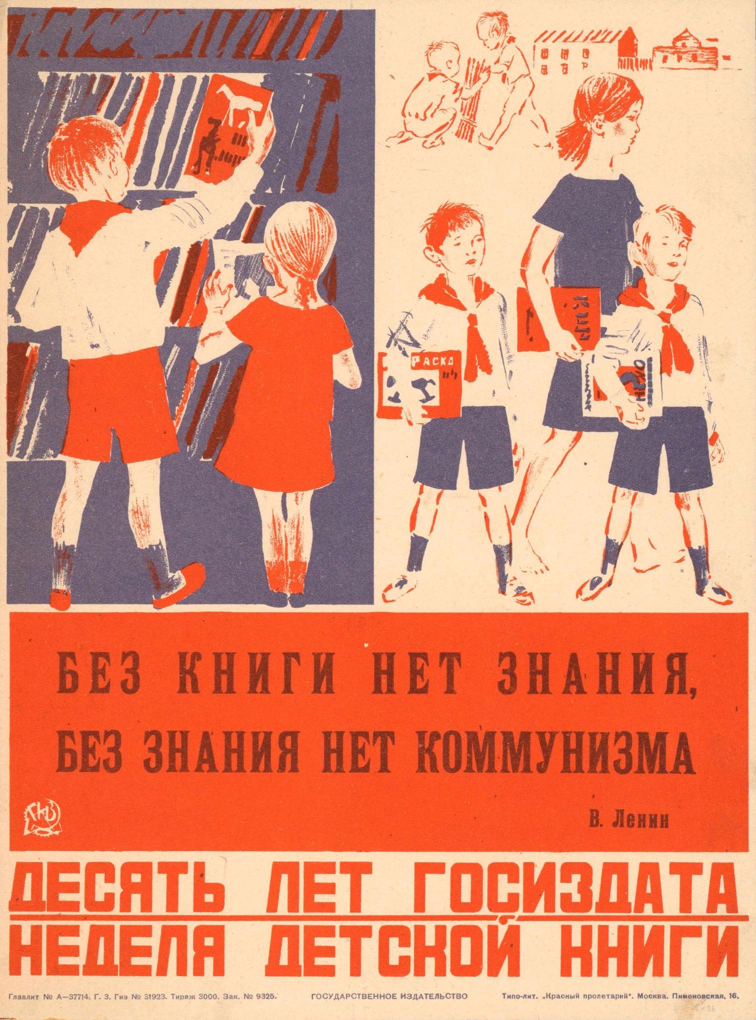 Плакат «Без книги нет знания, без знания нет коммунизма. В. Ленин» из серии «Десять лет Госиздата. Неделя детской книги». Москва: Государственное издательство, [1929]. Хромолитография, 35×26 см. 3 000 экз.